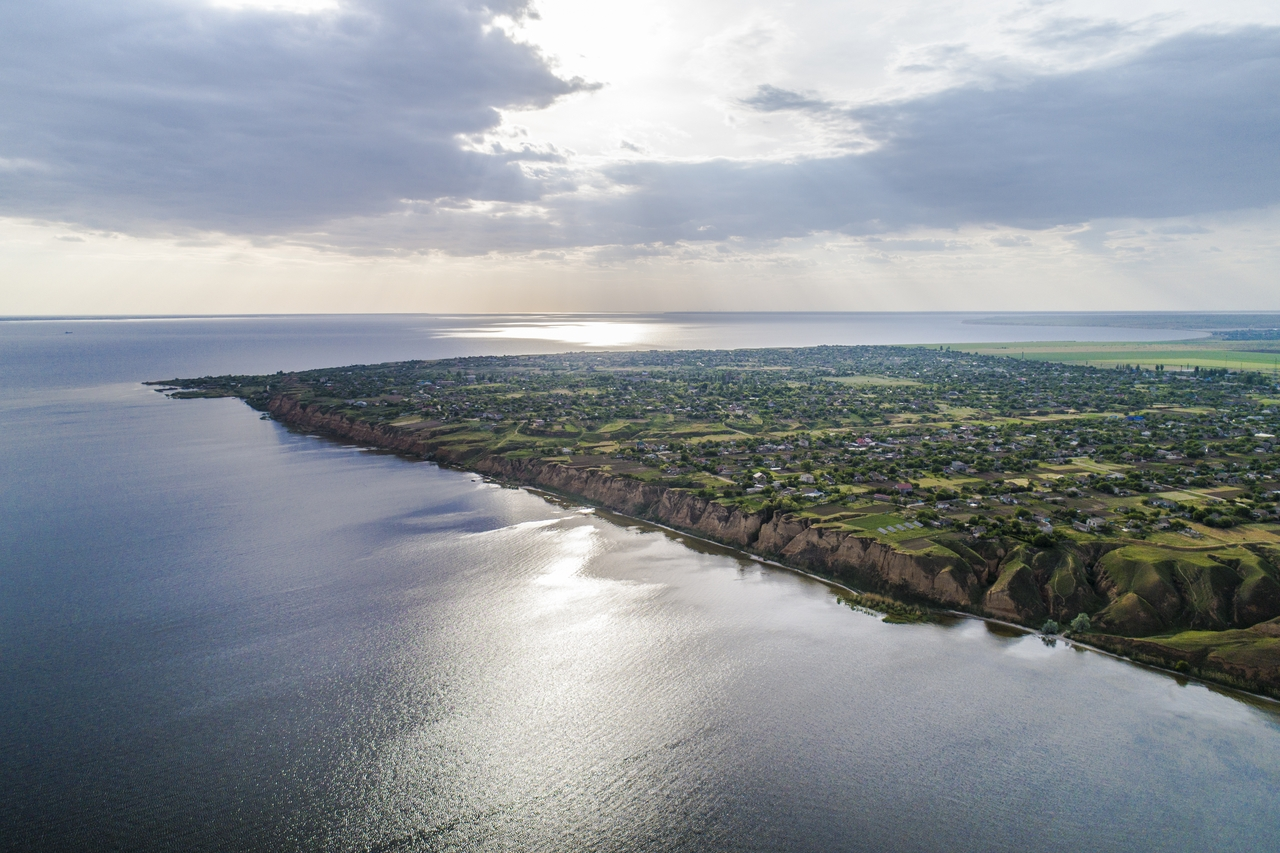 Станіславський заказник з висоти